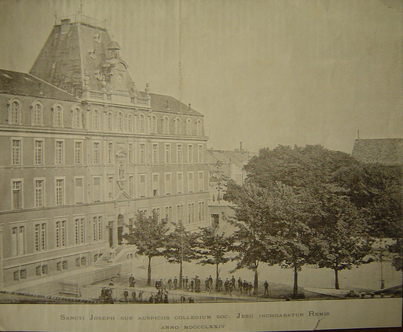 Bâtiment Saint-Jacques du Collège Saint-Joseph de Reims